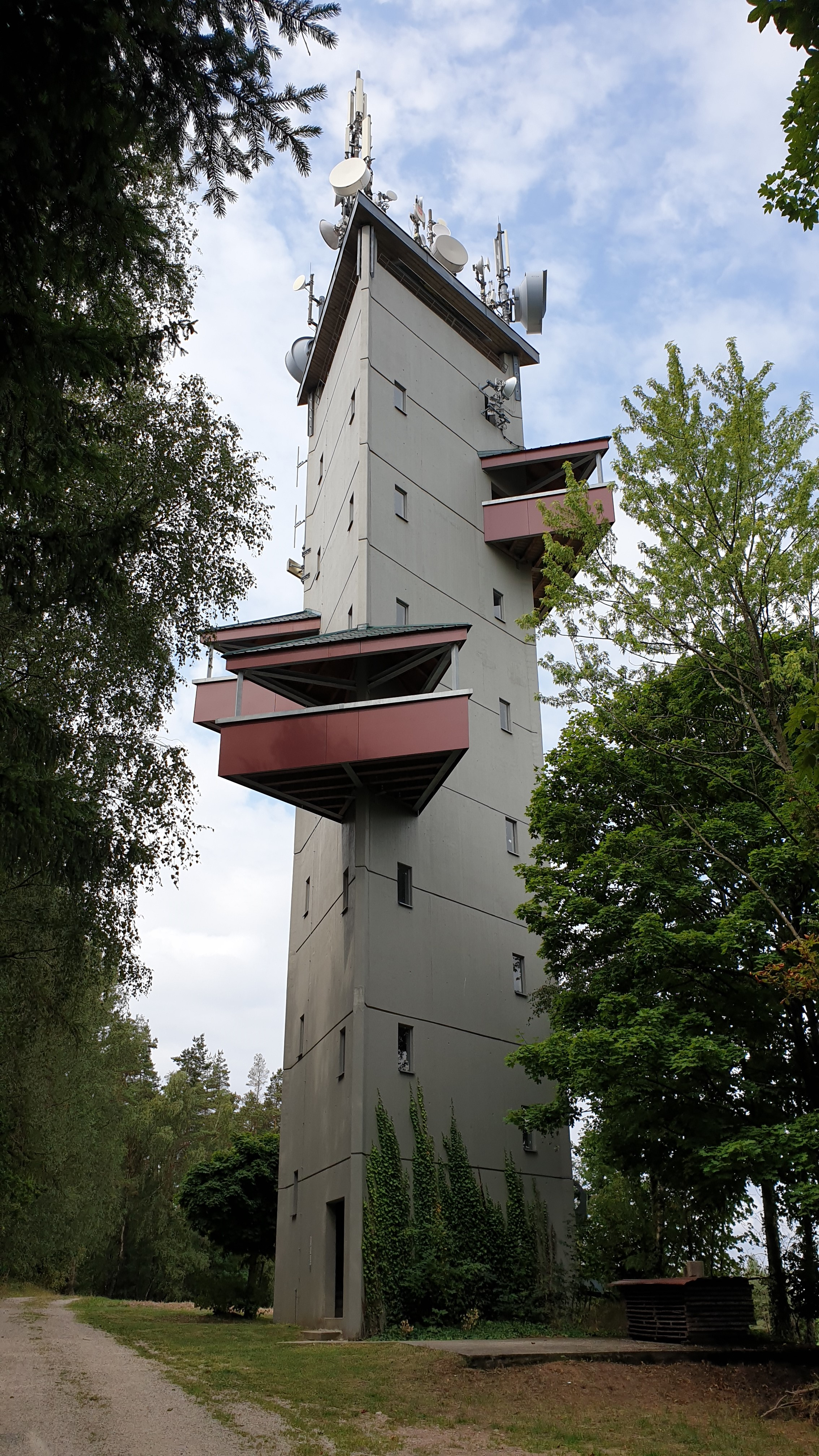 Aussichtsturm Rödlas im August 2019, Standpunkt östlich des Turms